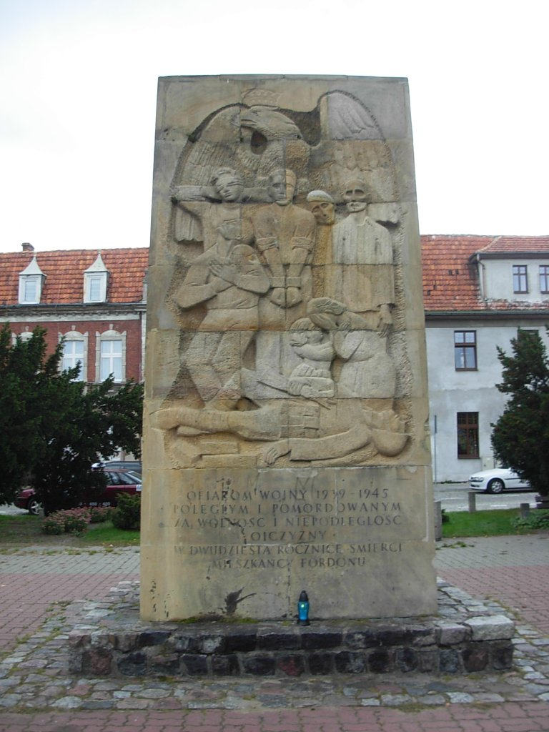 Pomnik Poległych na Rynku w Fordonie